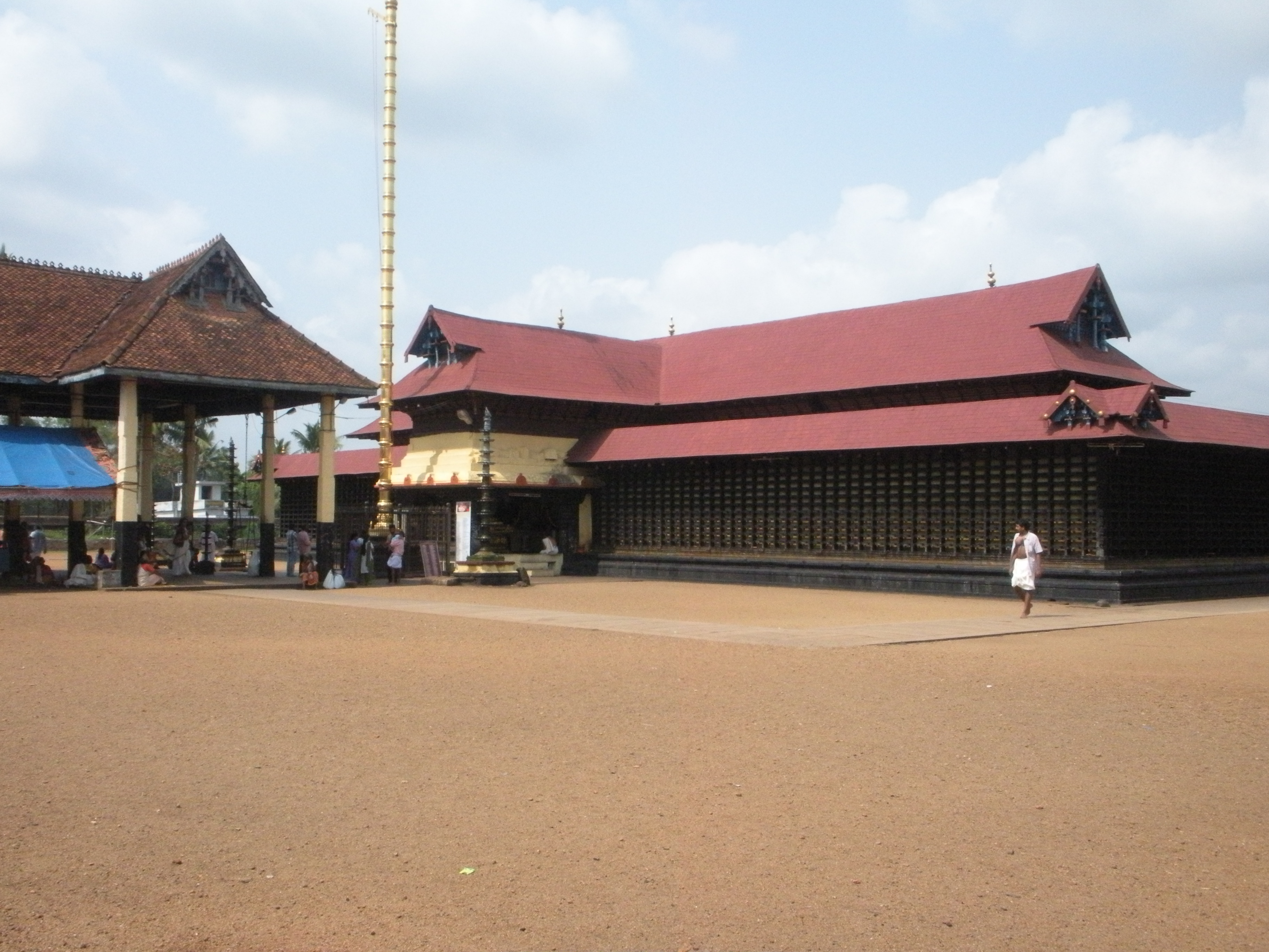 ആറന്മുള പാർഥസാരഥി ക്ഷേത്രം